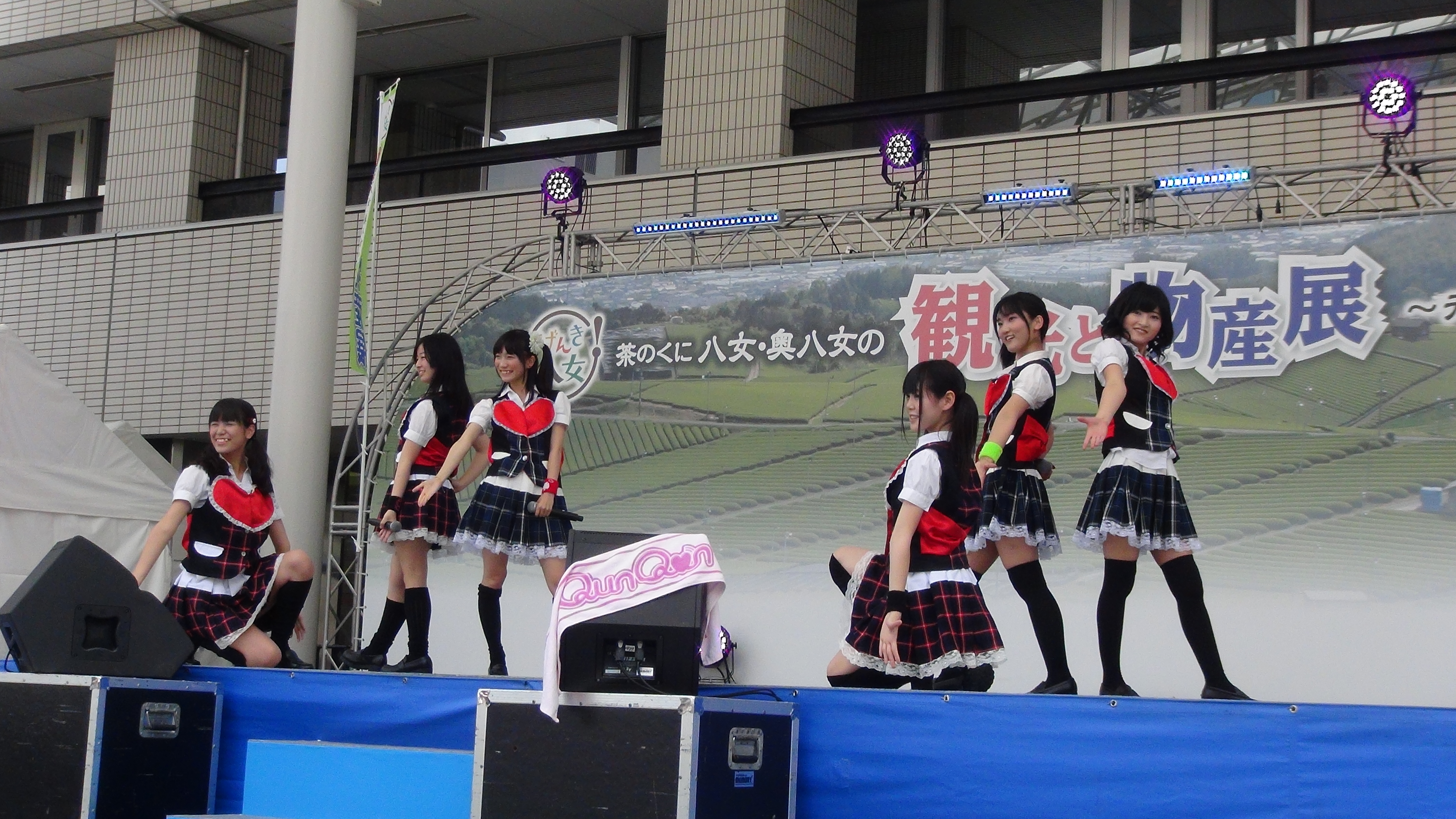 2013年5月26日、福岡のローカルアイドル「QunQun」のステージ写真